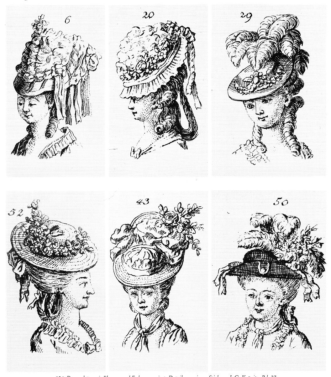 Damenhüte, mit den Erzeugnissen einer Blumenmanufaktur dekoriert.